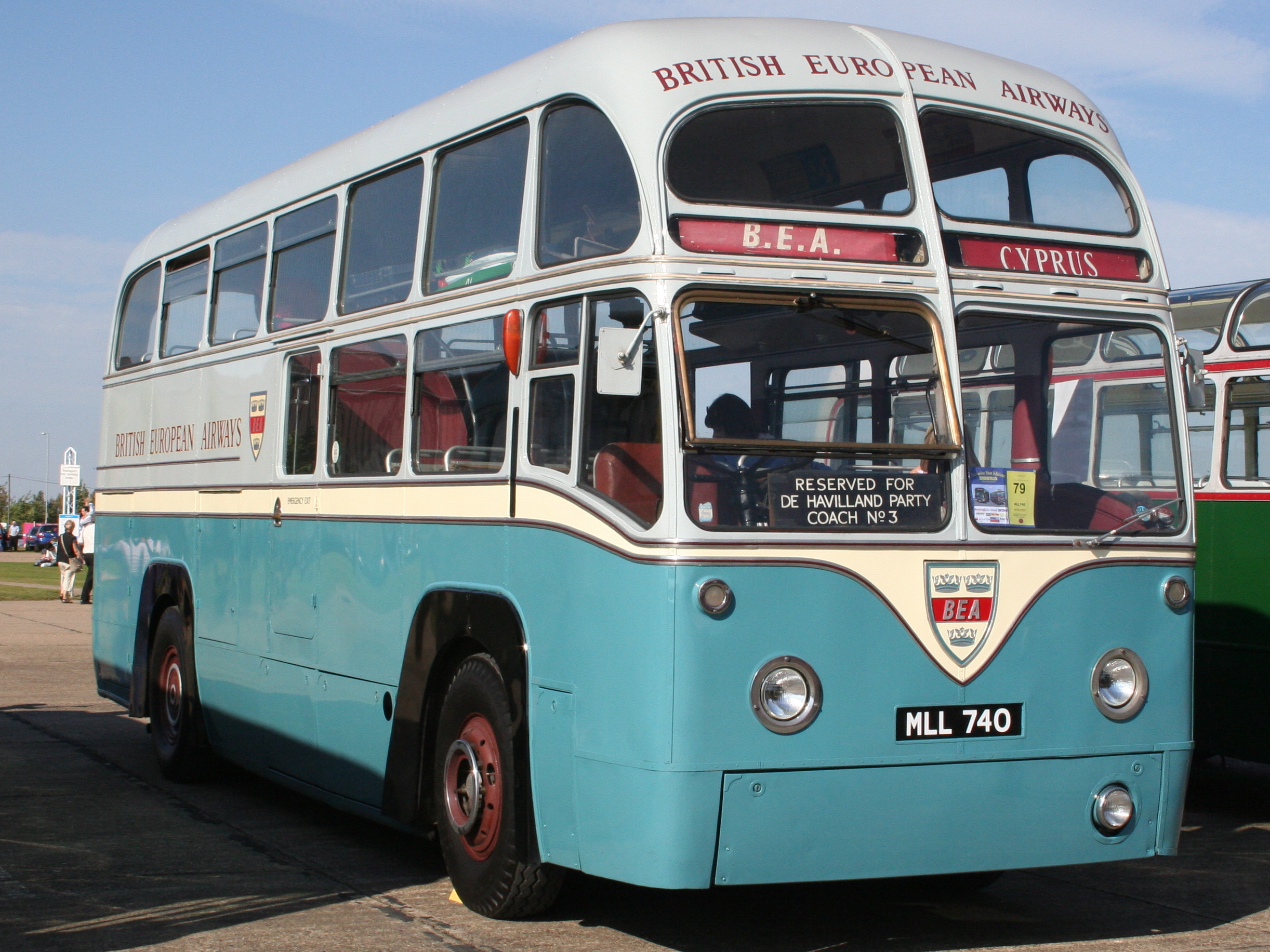 MLL740